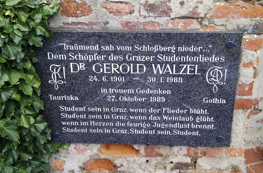 Gedenktafel Gerold Walzl, Grazer Schloßberg